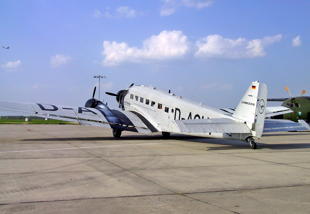 Eine Junkers Ju 52/3m D-AQUI der Lufthansa auf der ILA 2002.